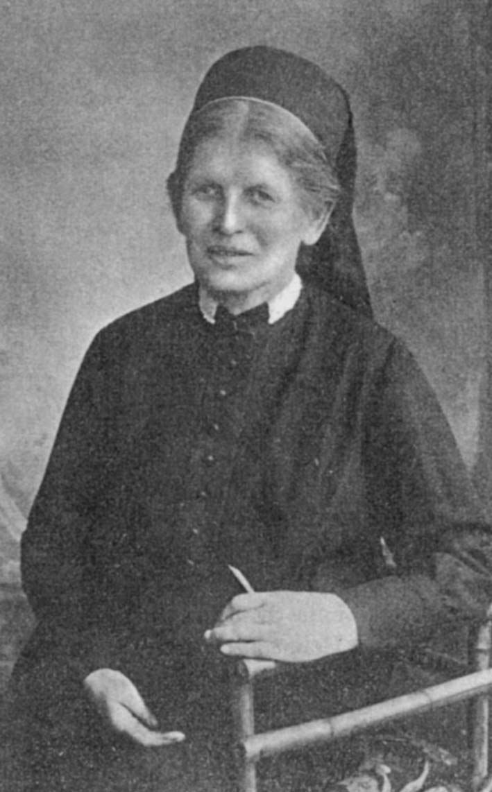 Datei mit dem Bild der Bertha Keyser aus OHLSDORF - Zeitschrift für Trauerkultur, I +II März 2008 Nr. 100/101, (Foto: Verein Garten der Frauen e.V.)